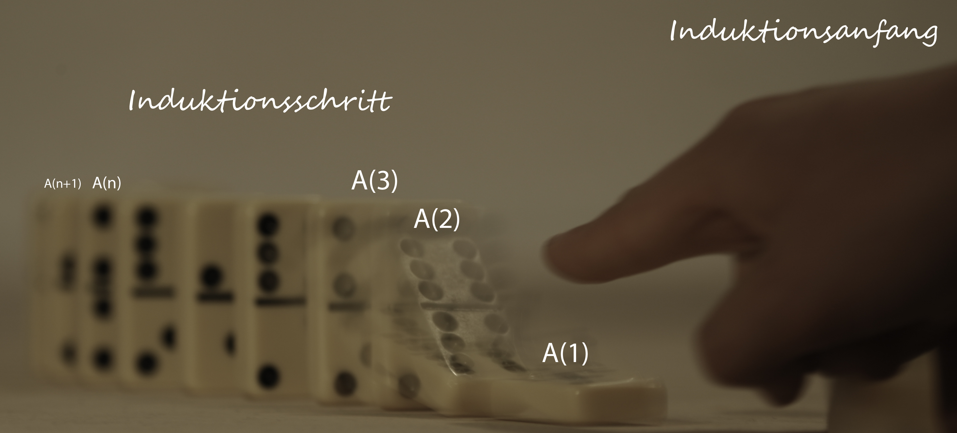 Veranschaulichung der vollständigen Induktion mit dem Dominoeffekt.